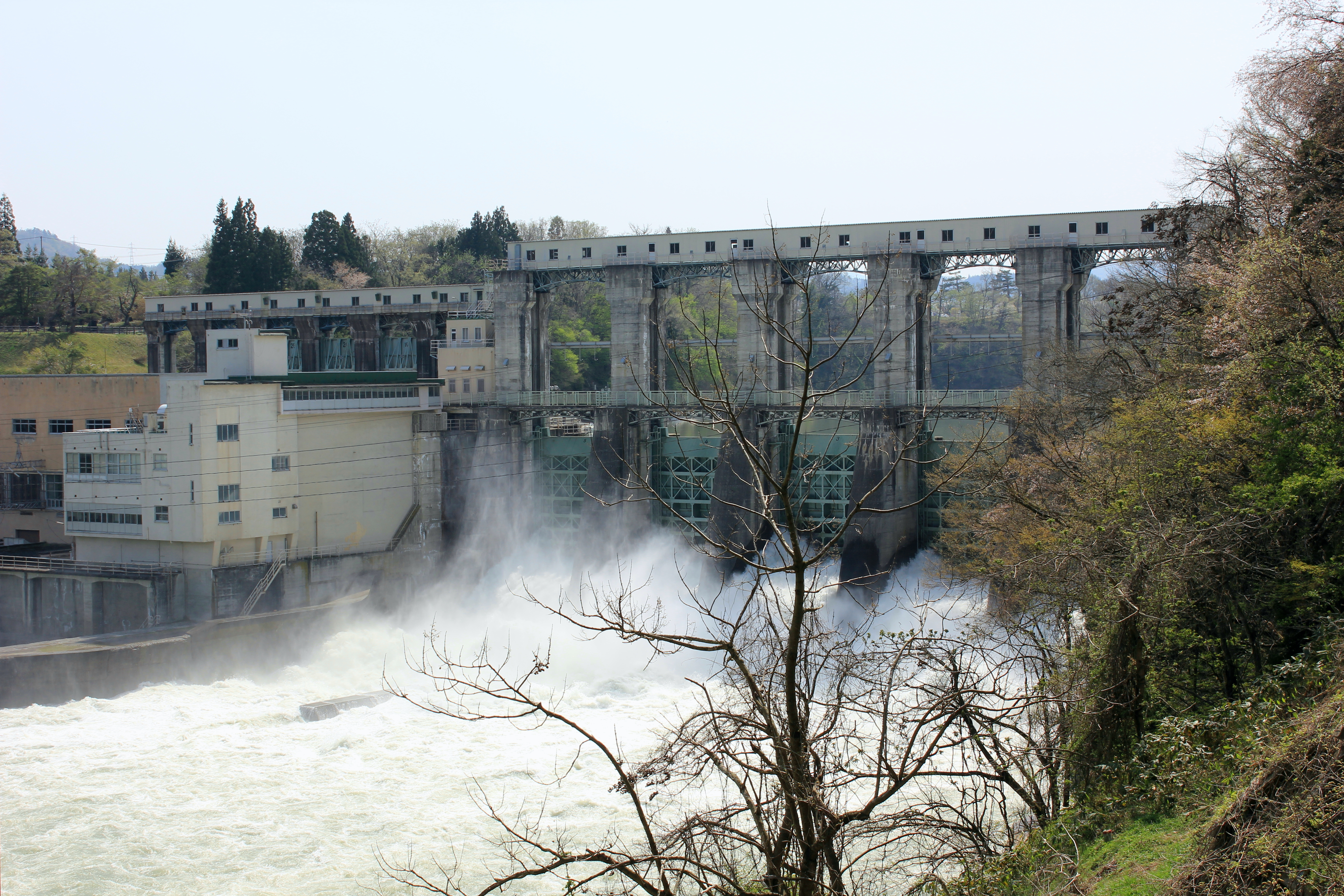 片門ダム（福島県・只見川。東北電力株式会社管理）